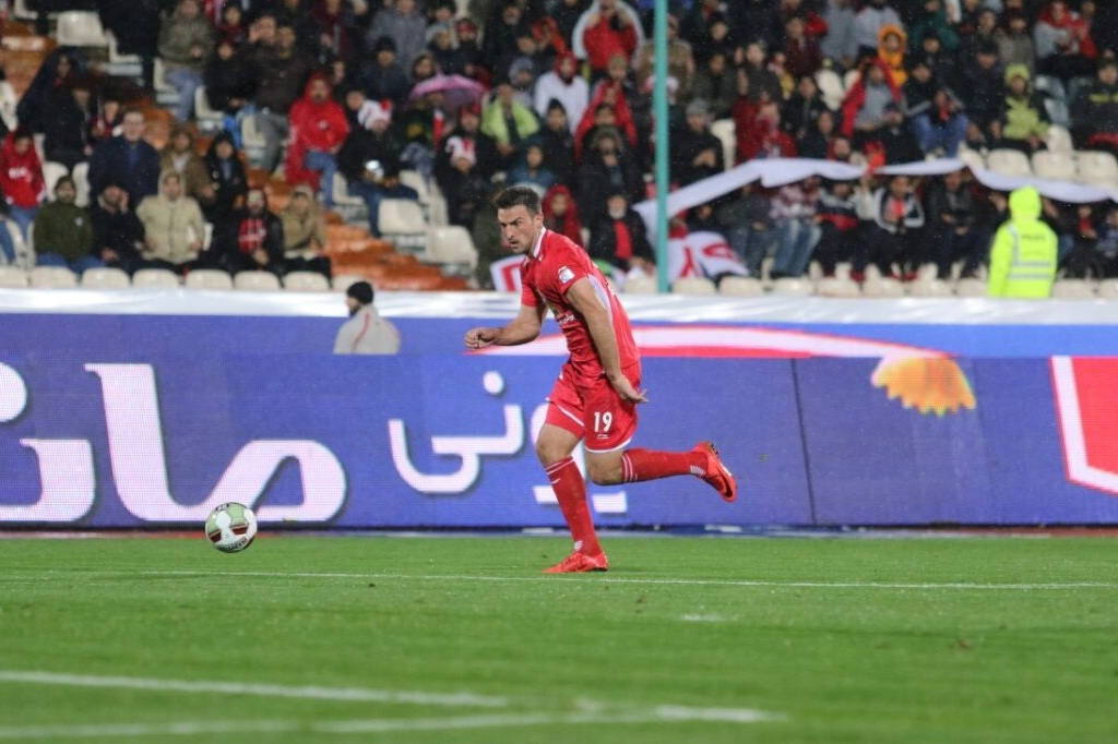 مسابقه پرسپولیس و نفت آبادان